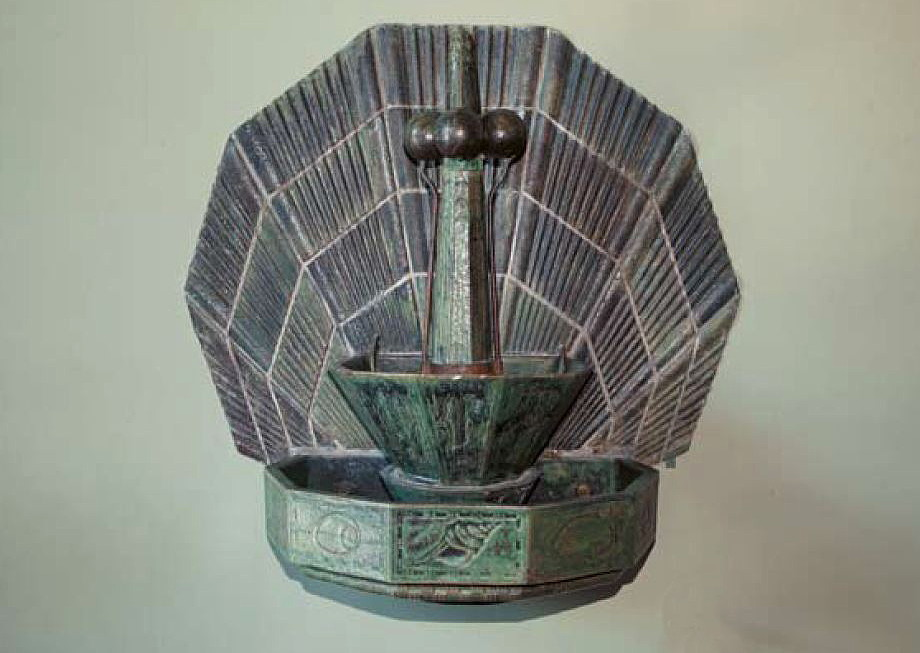 Konserthuset, dricksfontän i keramik av konstnären Henrik Krogh